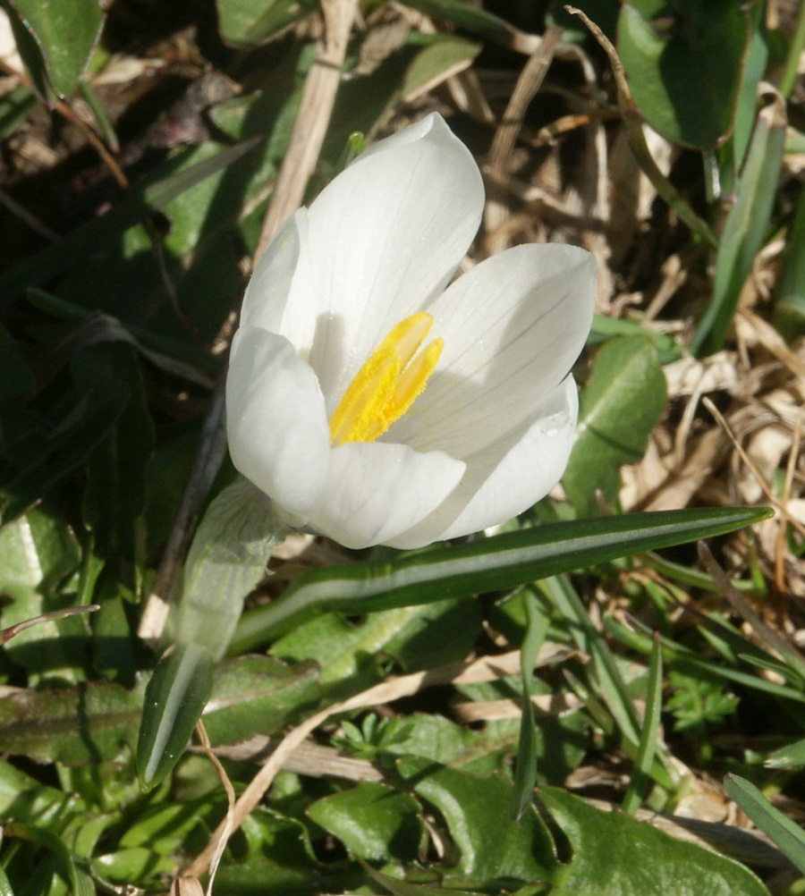 Crocus vernus subsp. albiflorus, Allgäuer Alpen, Germany